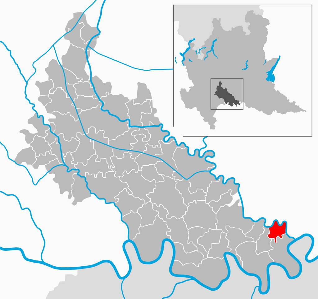 Il comune di Maccastorna nella provincia di Lodi